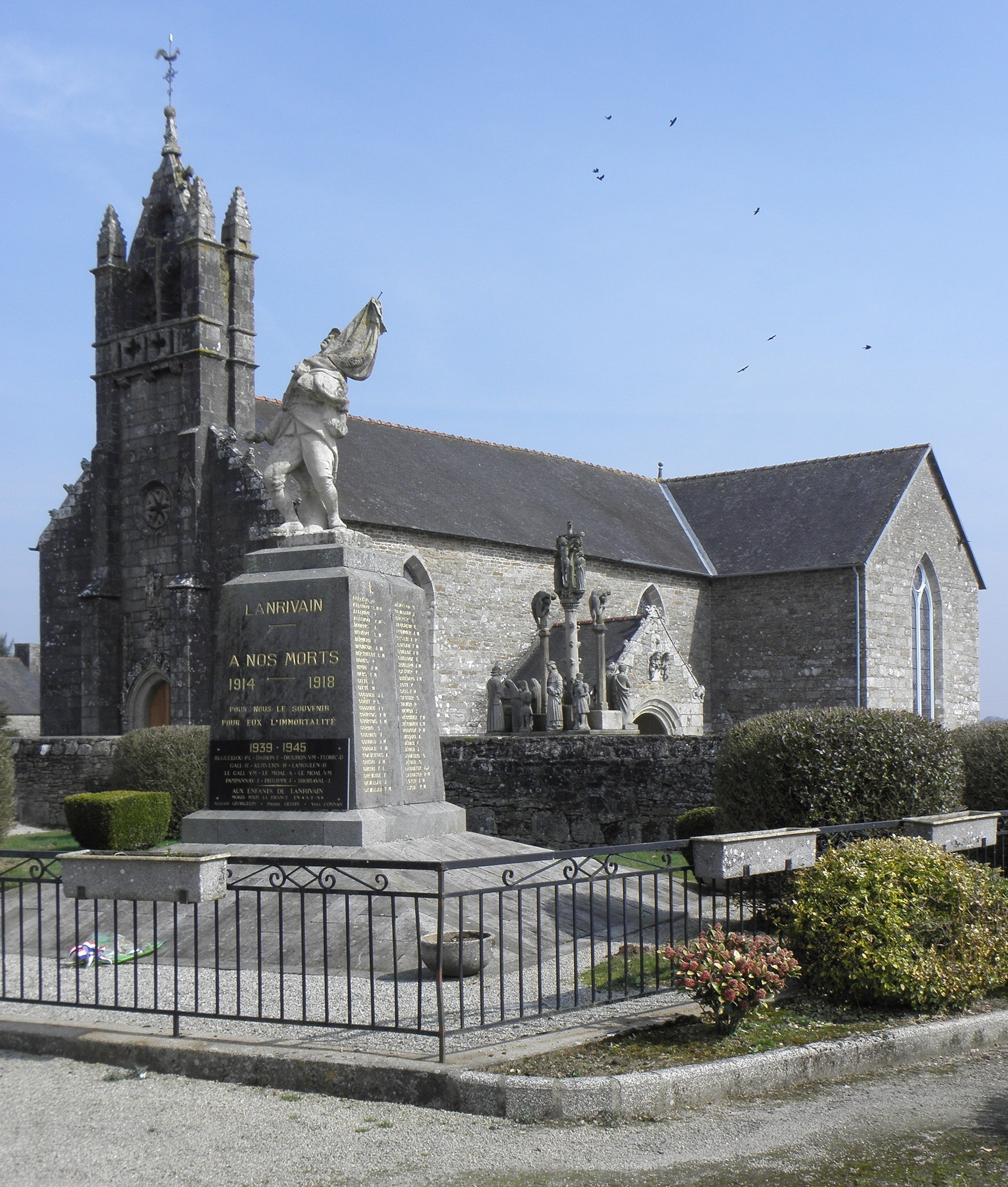 Monument aux morts et église Saint-Grégoire de Lanrivain (22).